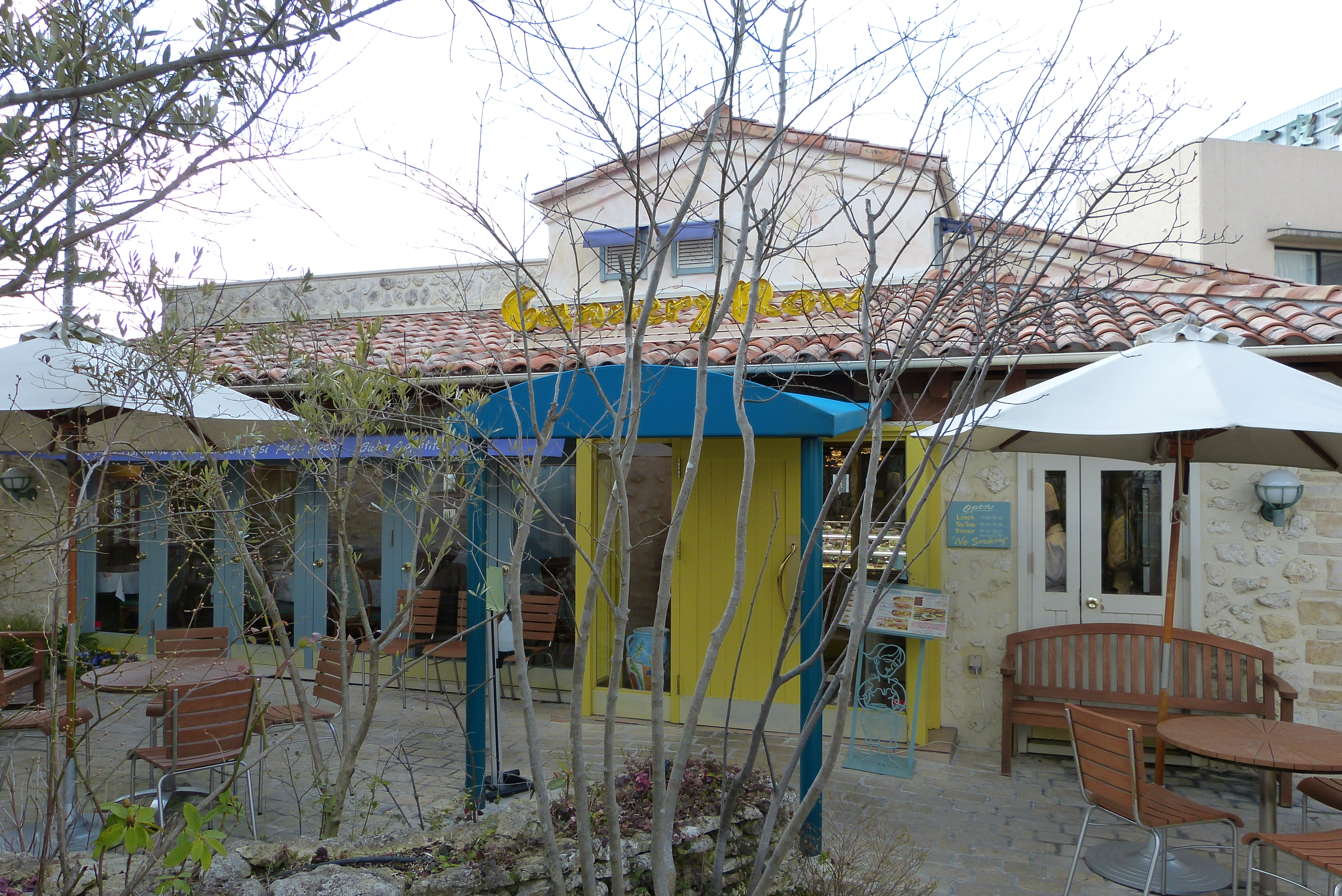 キャナリィ・ロウ レストラン